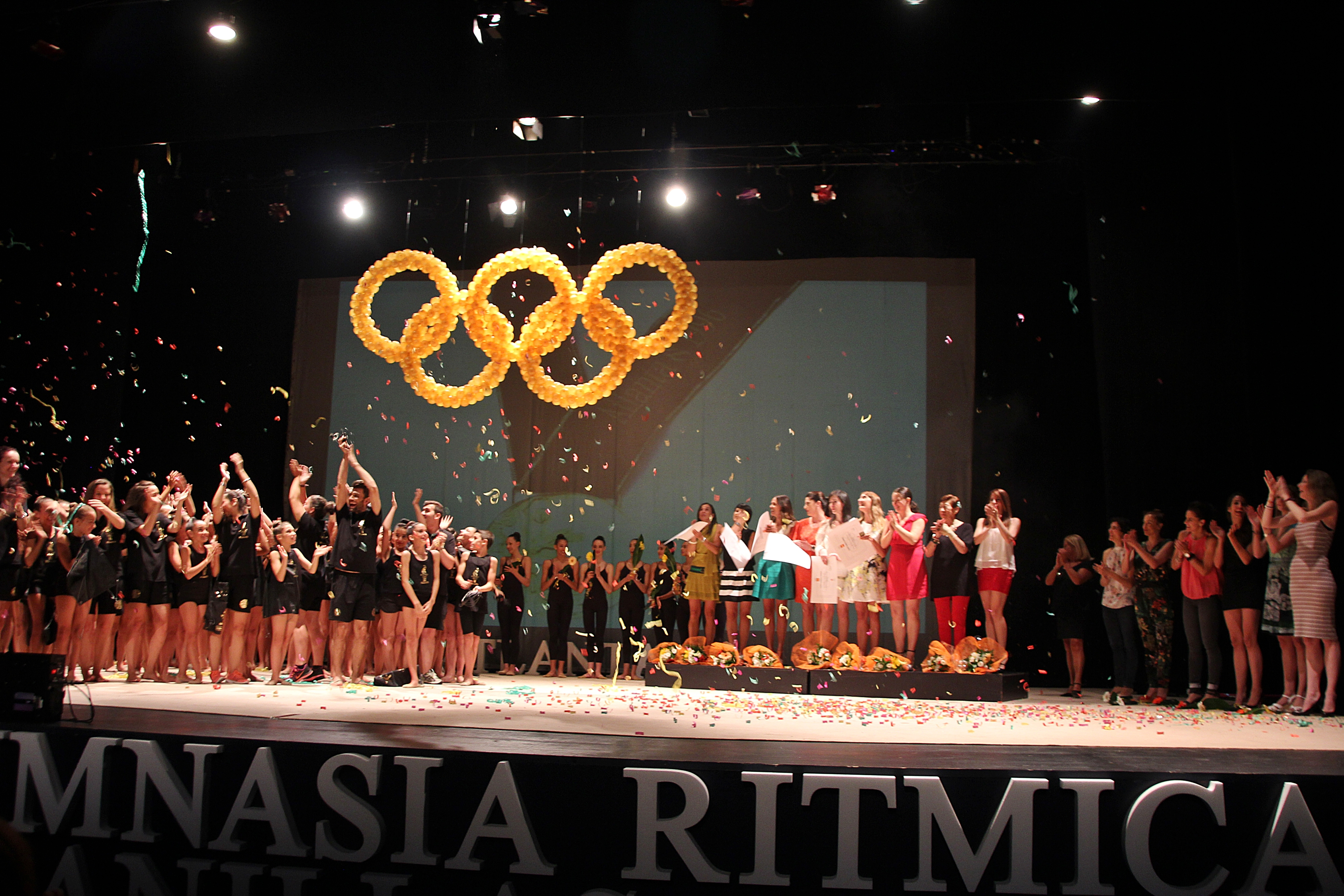 Vista general del escenario en la Gala 20º Aniversario de la Medalla de Oro de Atlanta '96 en Badajoz (2016).